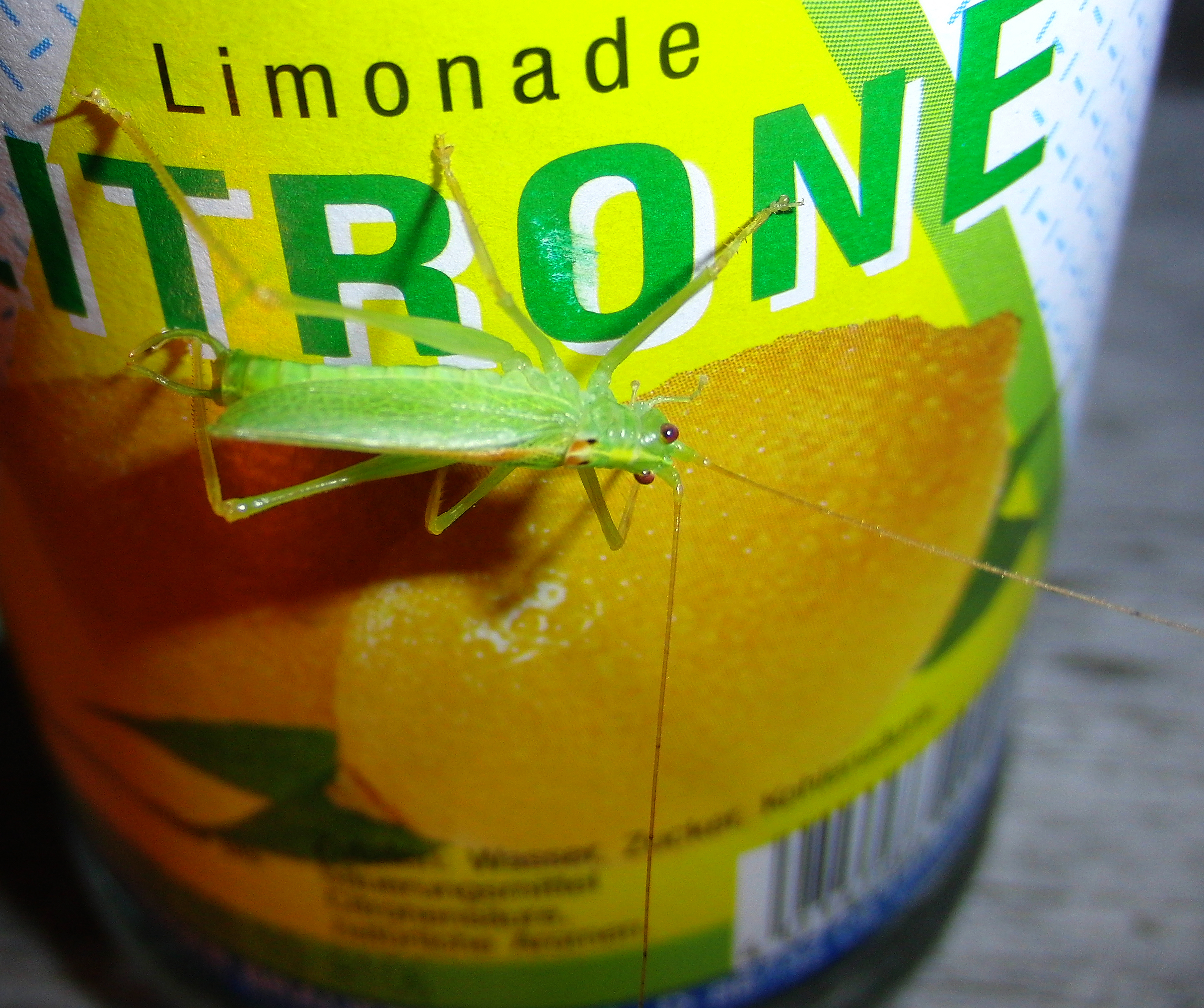 Meconema thalassinum, m., Gemeine Eichenschrecke, in a garden in Poecking, Bavaria, Germany, after dusk.